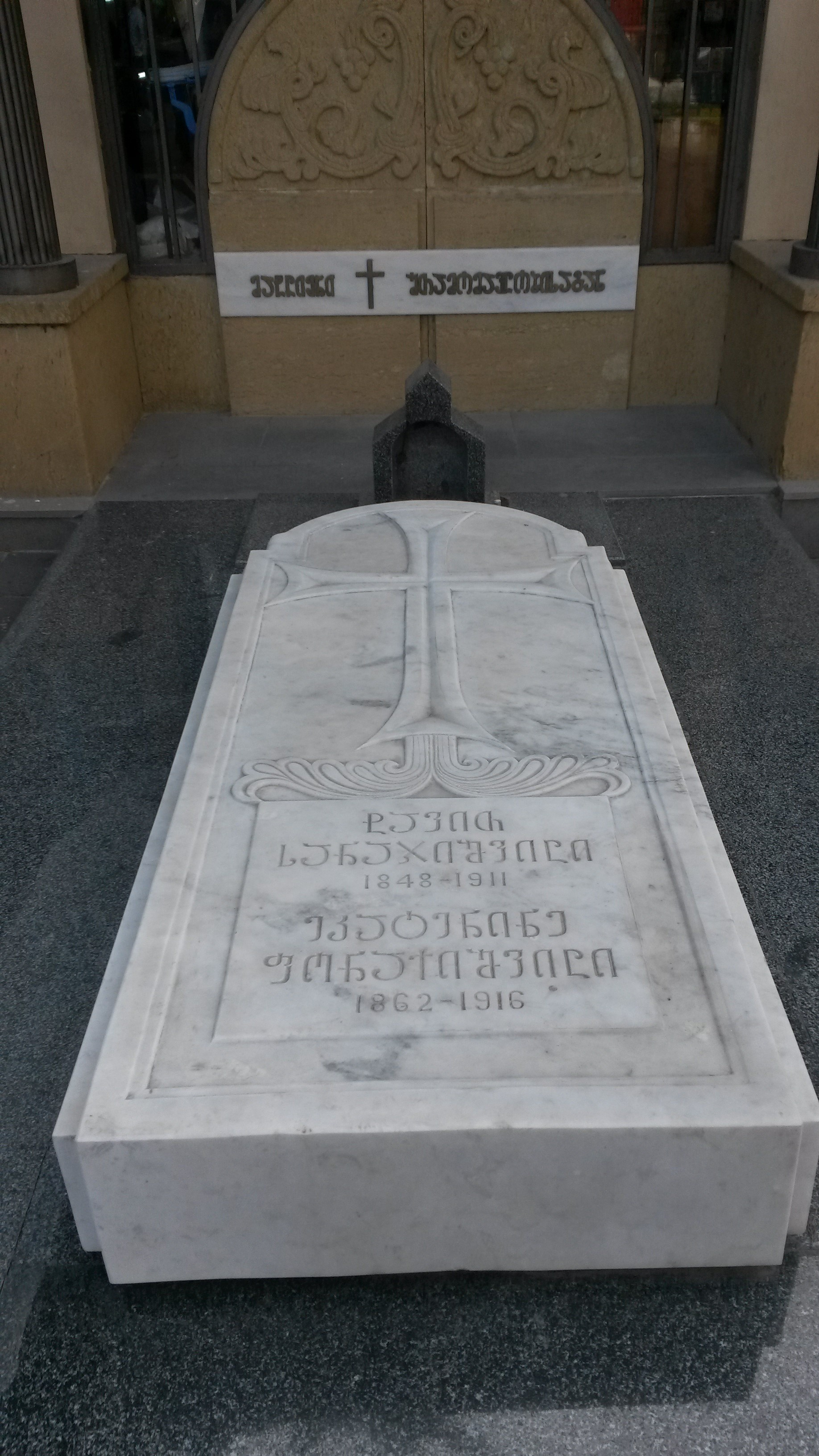 ქაშვეთის ეკლესია